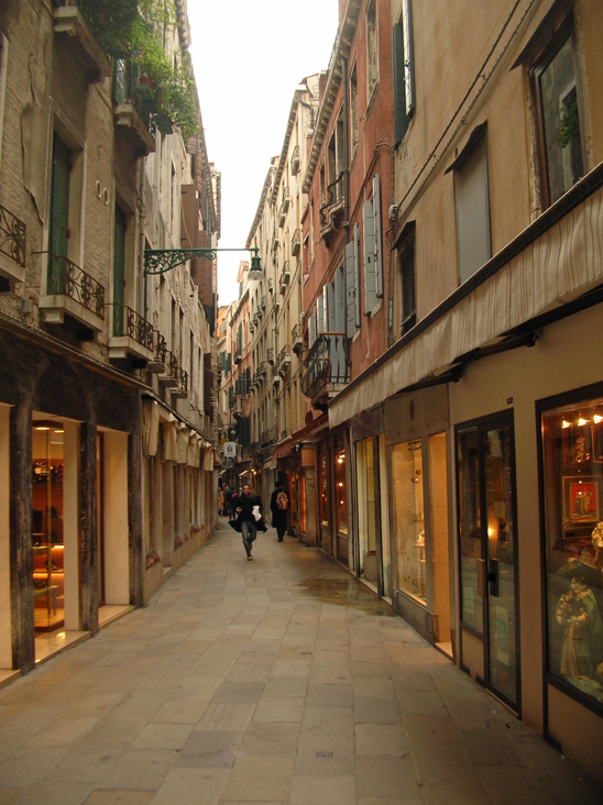 Foto di Frezzeria (Venezia) da Frezzeria stessa, all'altezza di Bocca di Piazza